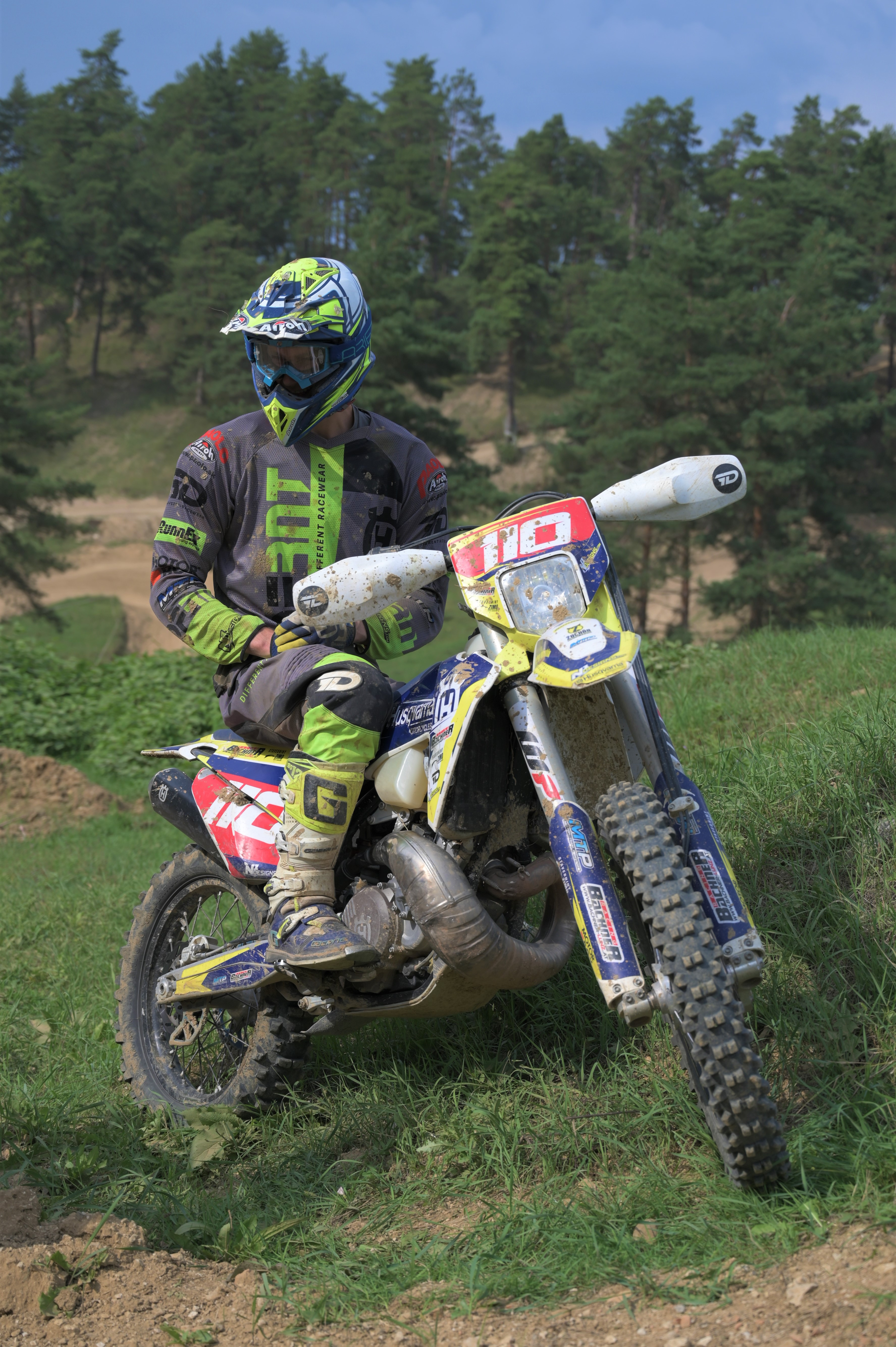 Thomas Hostinský na tréningu. Motocrossový areál Nitrianske Rudno, August 2019, motocykel Husqvarna TE 250 i